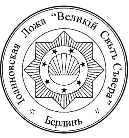 Печать ложи Великий Свет Севера в Берлине